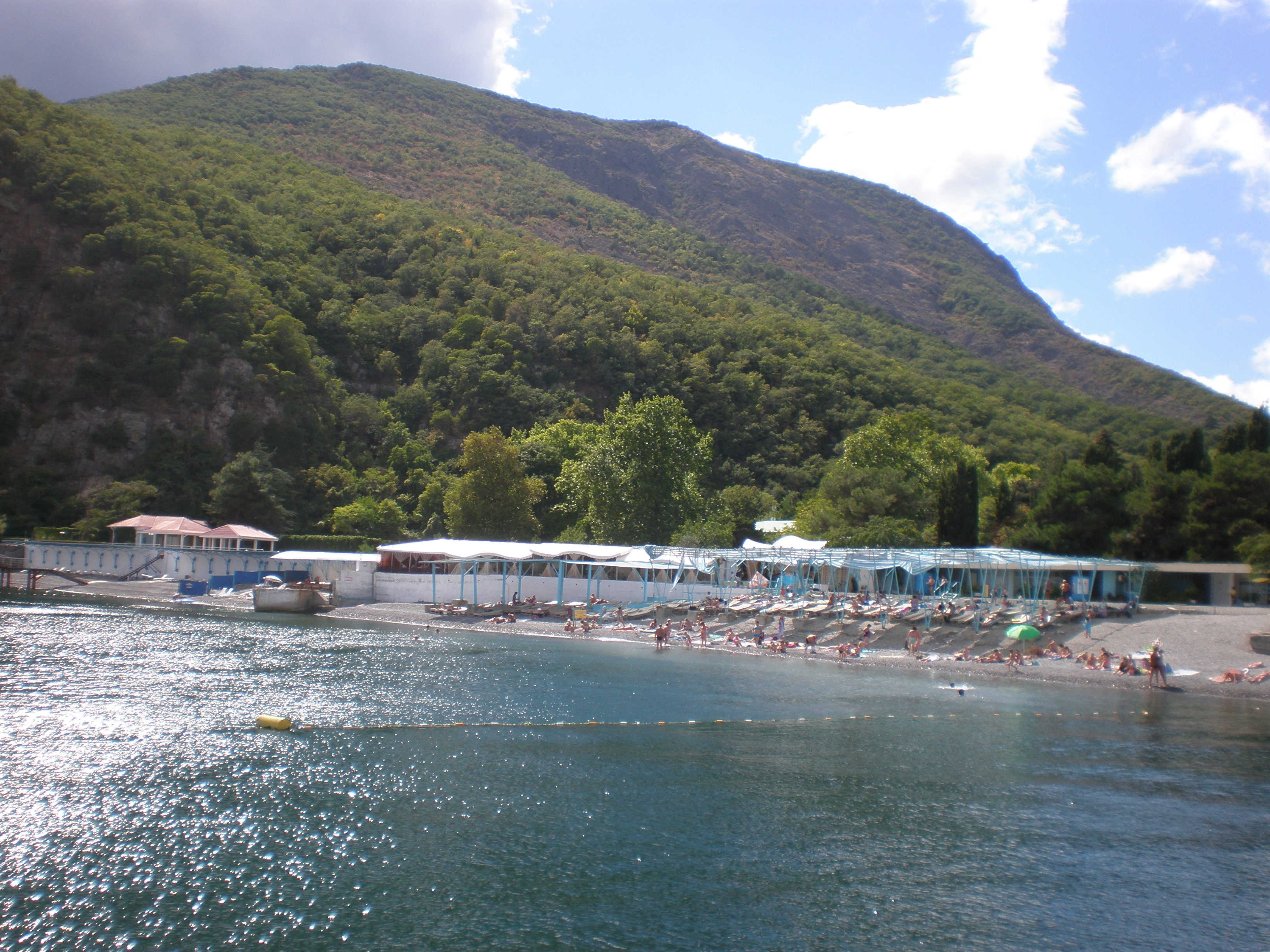 Аю-Даг, Запрудниньське л-во, кв.32 сел. Партеніт